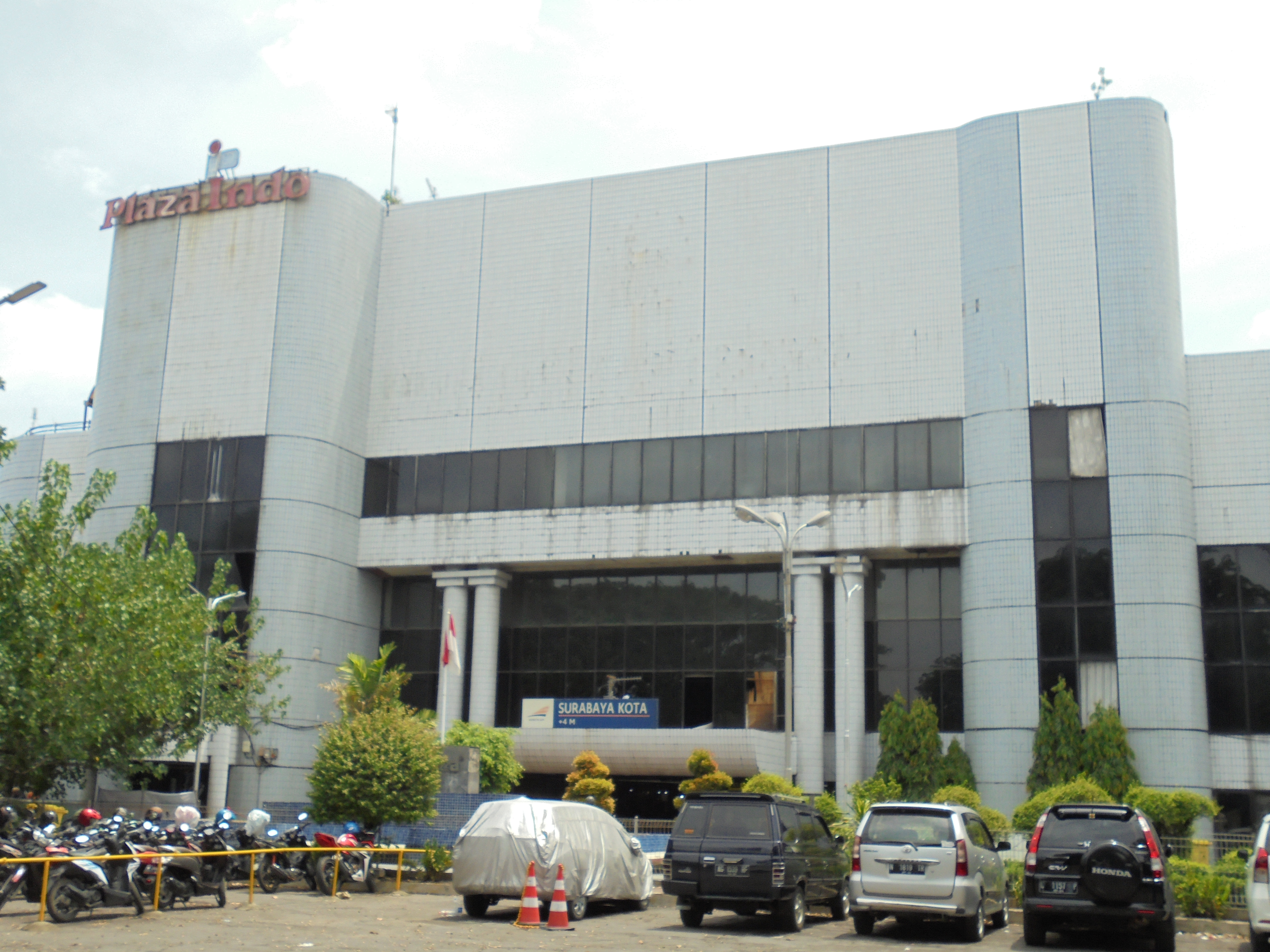 Tampak depan Stasiun Surabaya Kota yang terletak di Plaza Indo